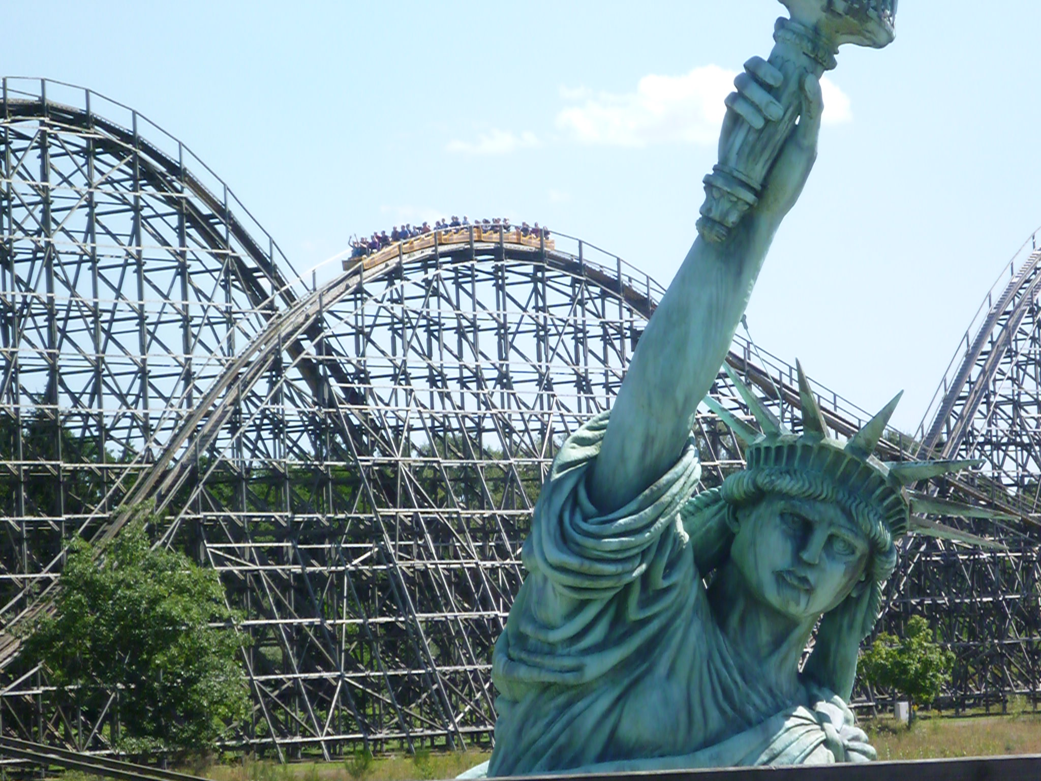 Statue Of Liberty mit Colossos.